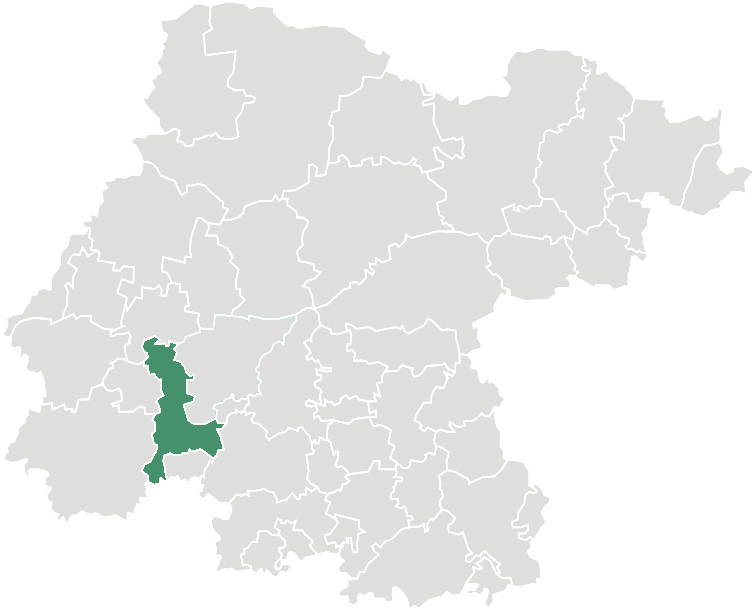 Ubicación del municipio de Abasolo en el Estado de Guanajuato